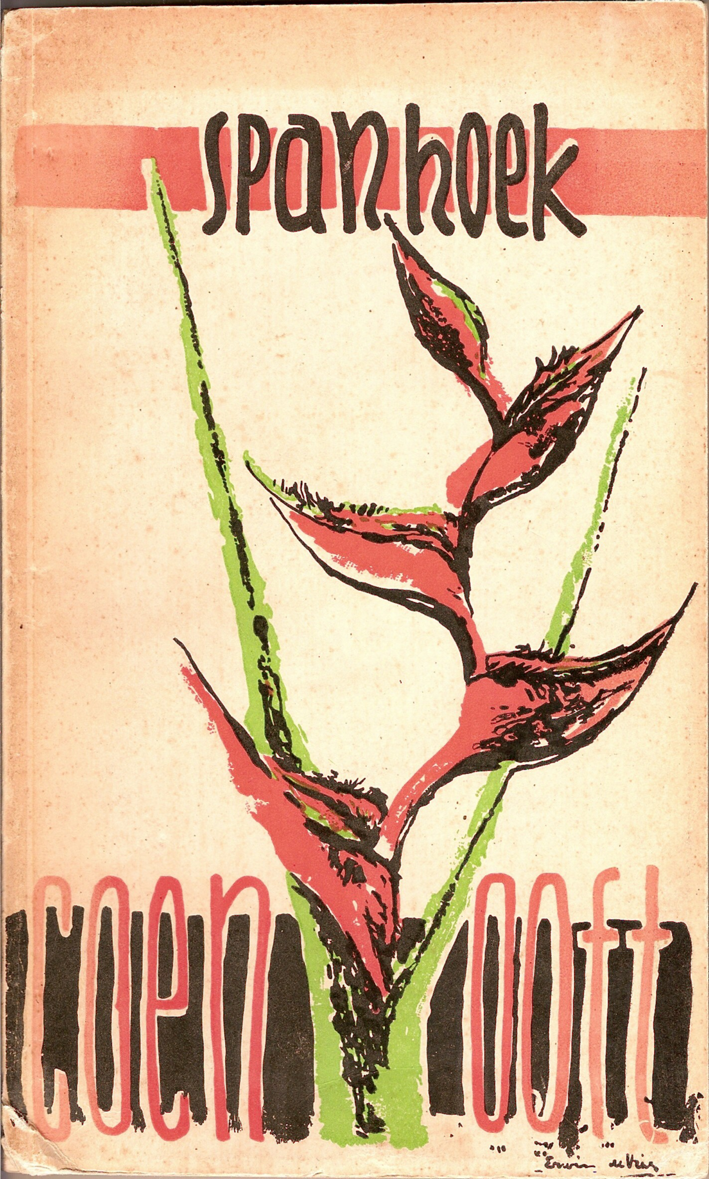 Omslag van de bundel Spanhoek van Coen Ooft. Gereproduceerd met toestemming van de auteur.